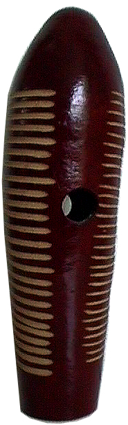 Guiro eigen foto (GFDL) categorie:afbeelding muziekinstrument